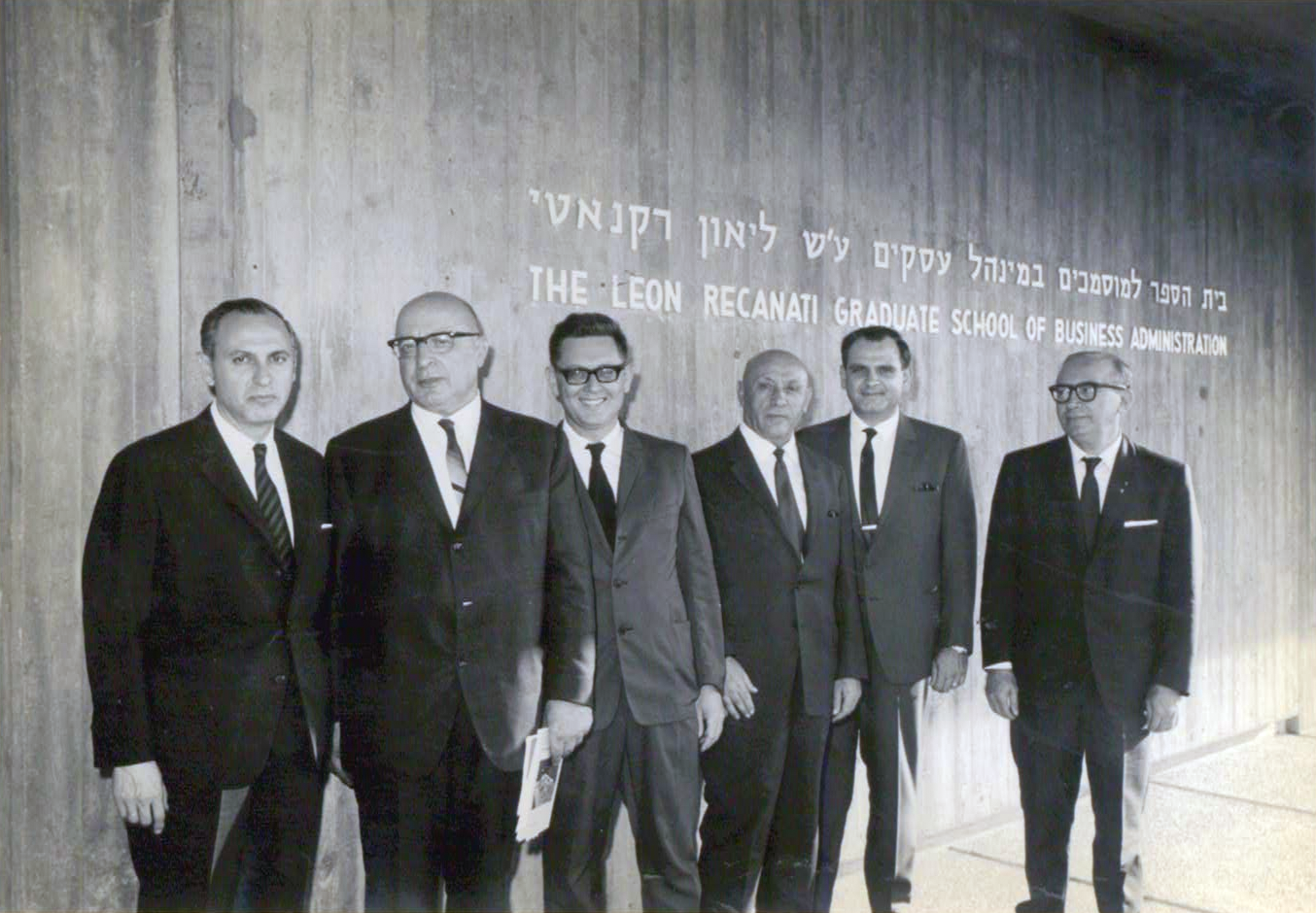 שני מימין יעקב (ז'ק) רקנאטי וראשון משמאל דניאל רקנאטי בטקס פתיחת ביה"ס למוסמכים במנע"ס באוניברסיטת תל אביב